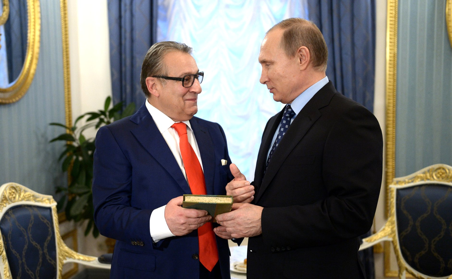 Владимир Путин поздравил народного артиста, художественного руководителя Московского государственного театра эстрады Геннадия Хазанова с юбилеем